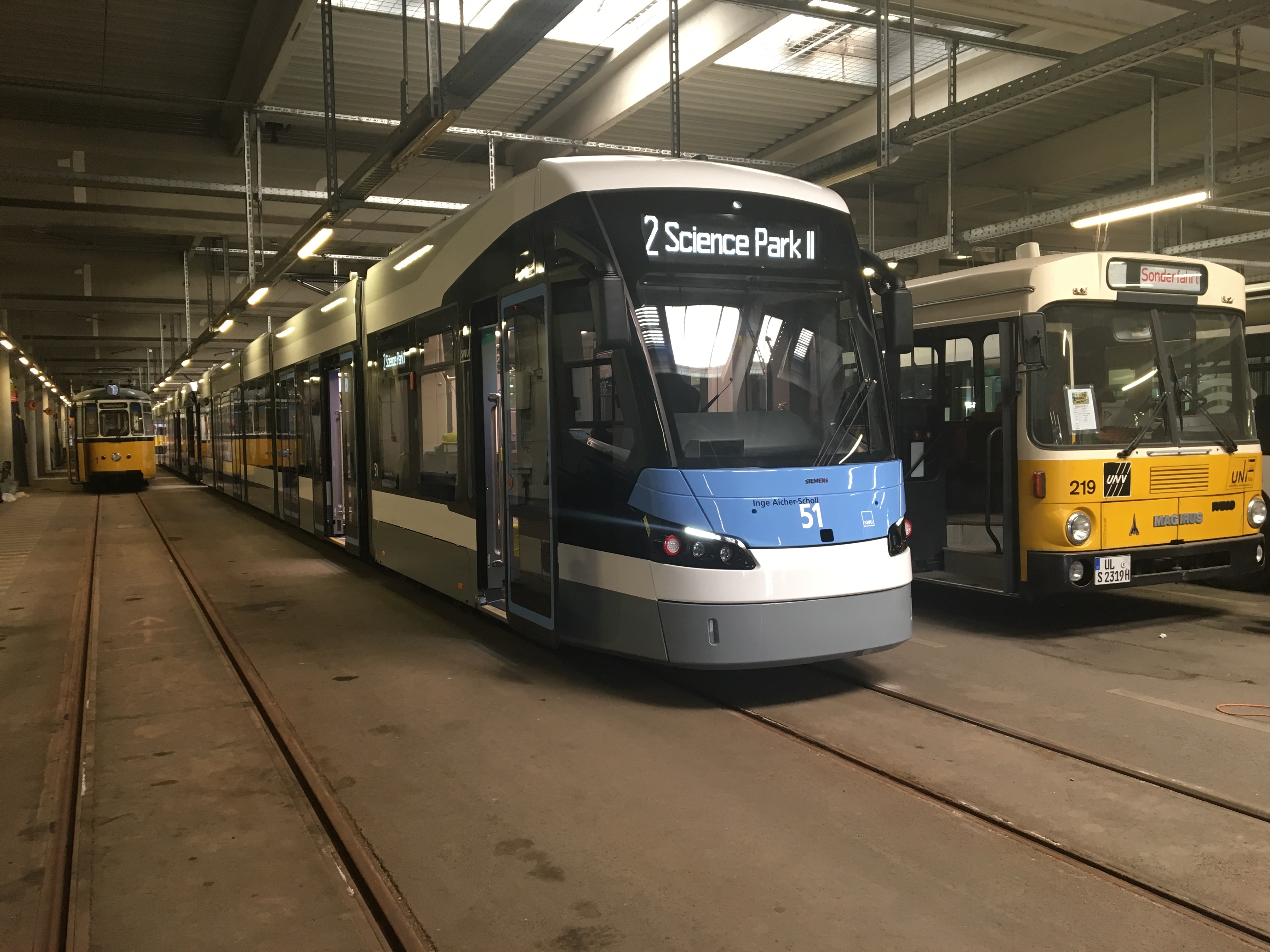 Wagen 51 der neuen Avenio-Flotte, benannt nach Inge Aicher-Scholl. Aufgenommen in der Wagenhalle der SWU Verkehr bei der Vorbereitung auf die öffentliche Vorstellung des Fahrzeugs.